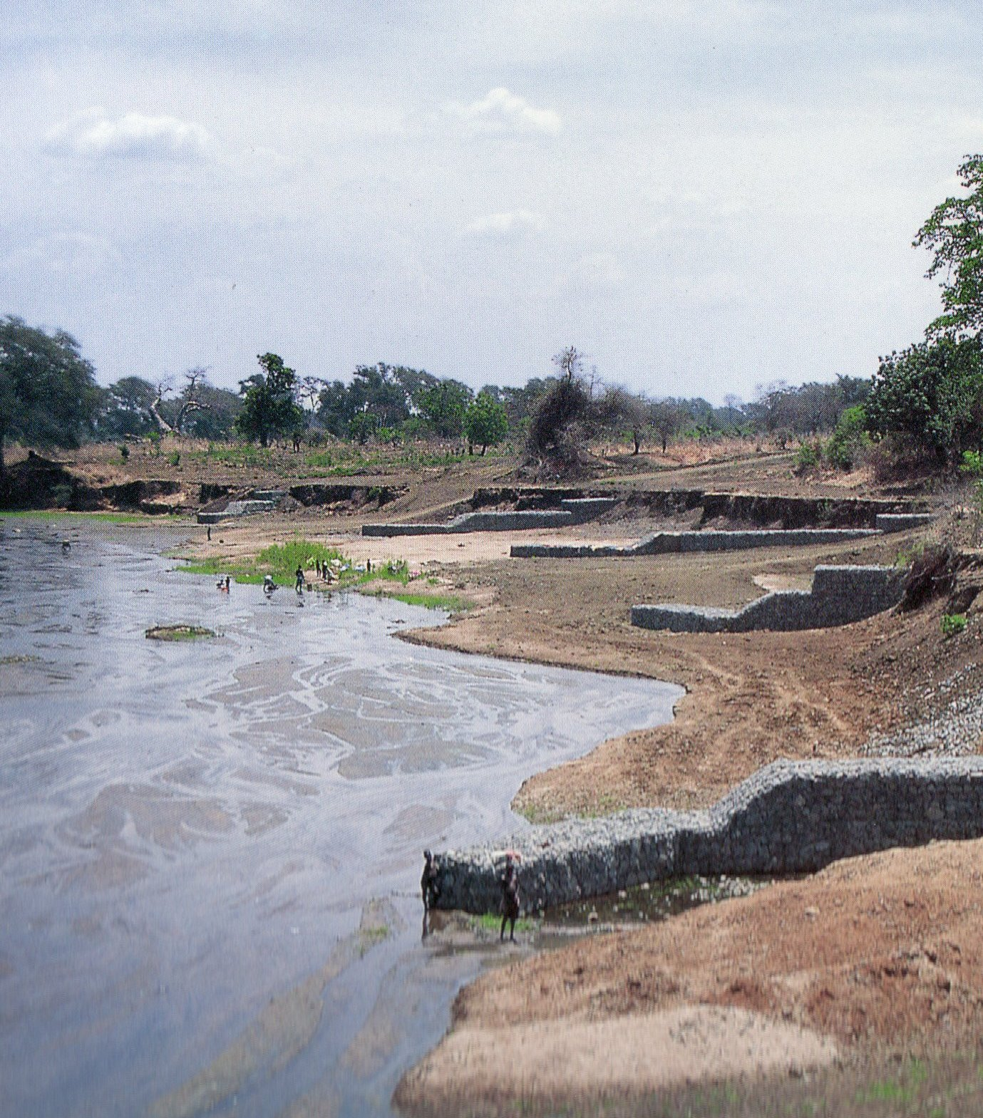 Espigones construidos con gaviones Autor: Alfredobi Fecha: 1999